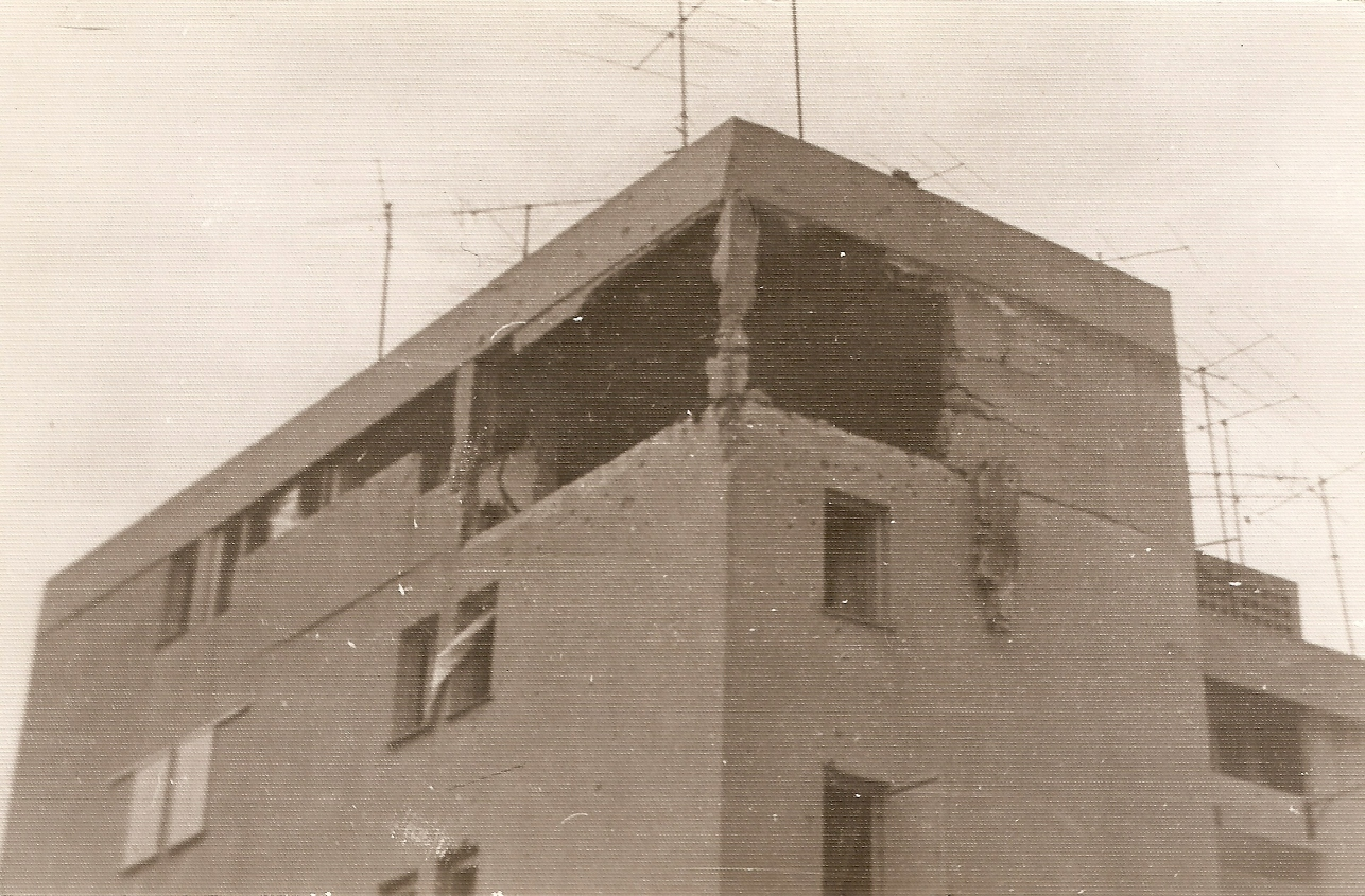 בניין מספר 15 ברחוב יהודה הלוי, לאחר הפיצוץ בדירה בה שהו המחבלים